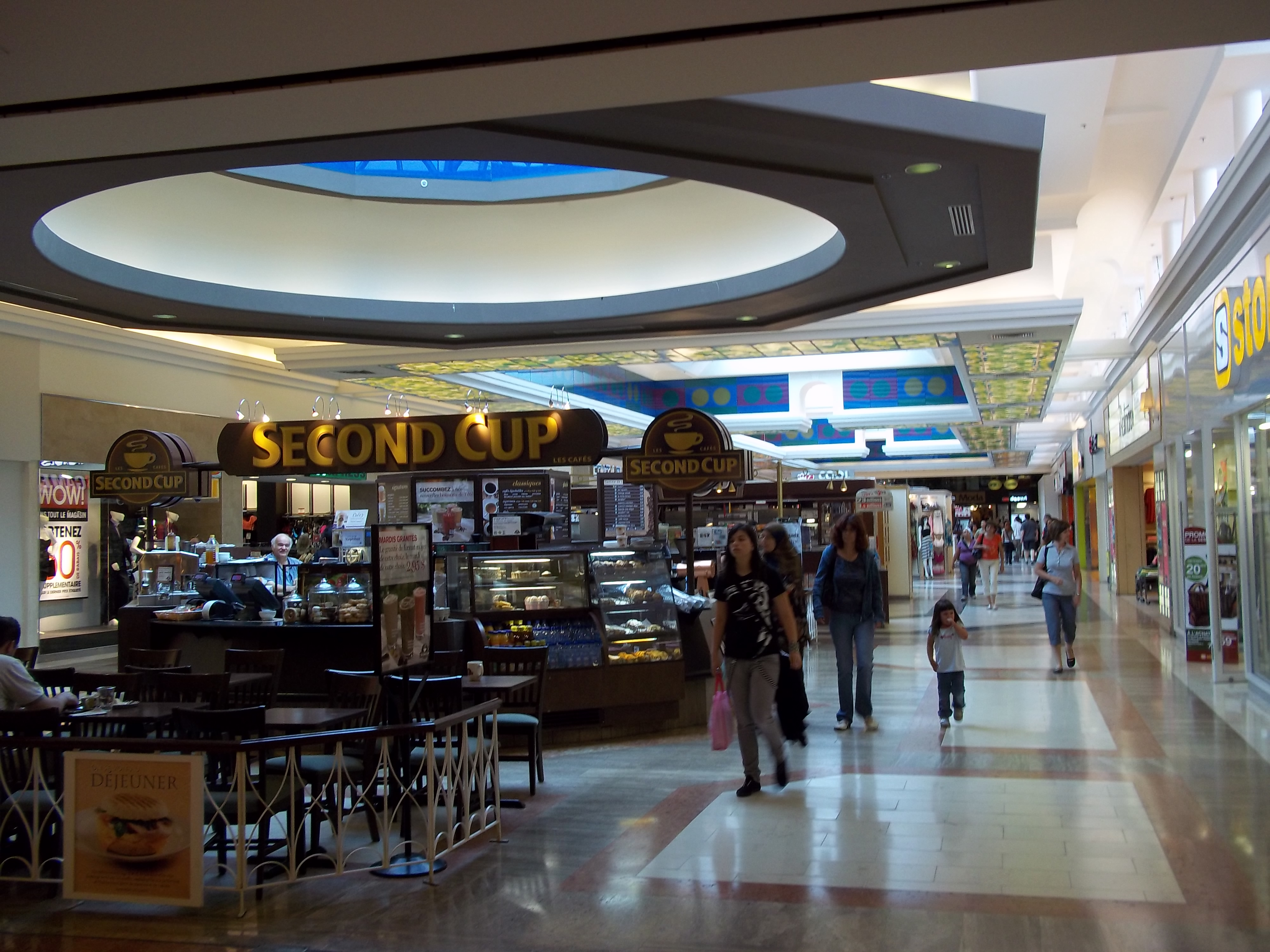 Place Versailles, Montréal